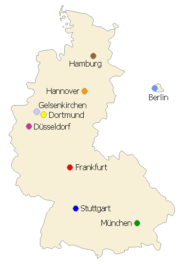 Spielorte der 10. Fußball-Weltmeisterschaft 1974 in Deutschland Author: Soccerates